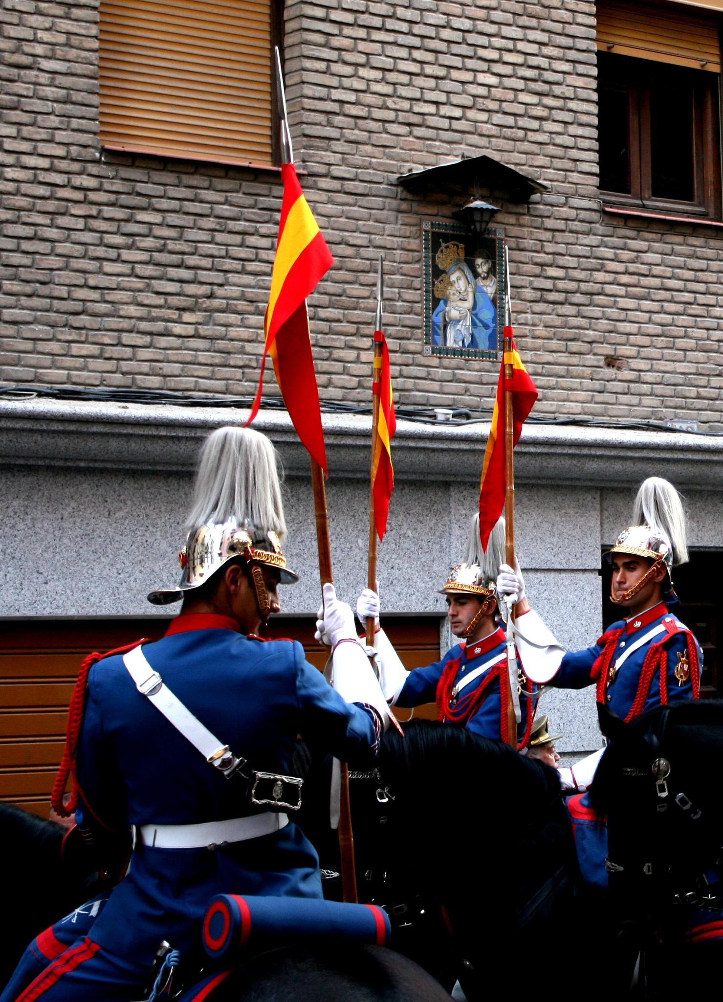 La Guardia Real en el acto celebrado en la plaza de Zocodover, Toledo (España), en homenaje a los que lucharon en la Guerra de la Independencia frente a los franceses.